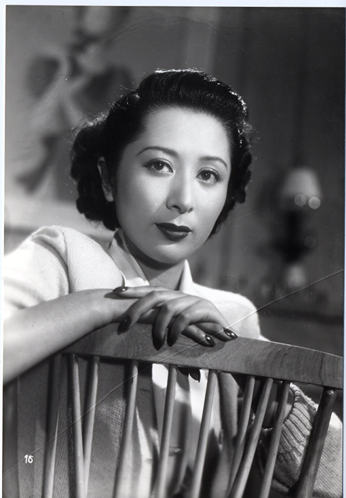 映画『晩春』（1949年）の一場面。月丘夢路